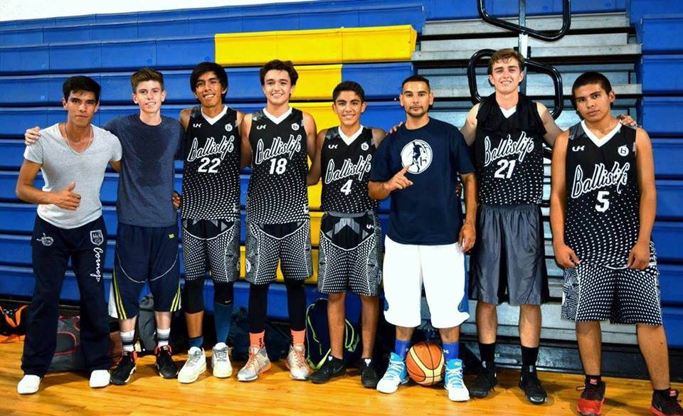 Selección Tepatitlán en CODE Gdl.